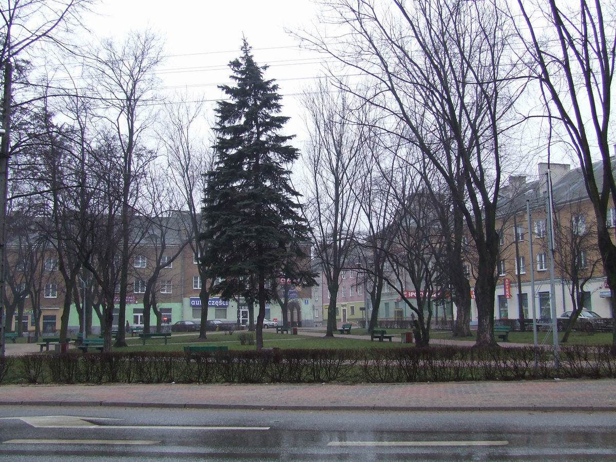 Rynek w Zambrowie z drogi Wwa-Białystok